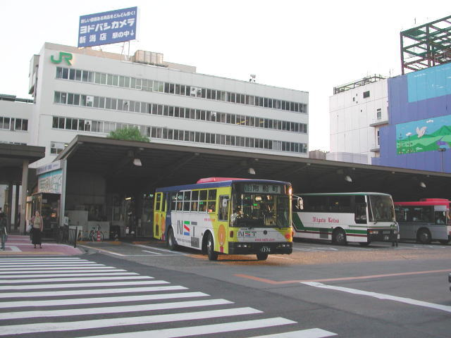 JR新潟駅・万代口バスターミナル、JR東日本新潟支社、JR貨物新潟支店